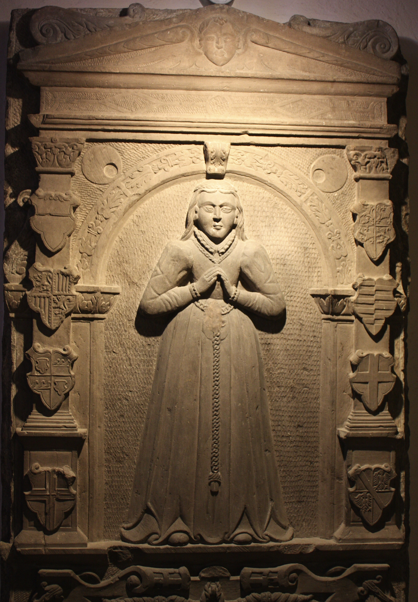 Grabmal der 1573 verstorbenen Katharina von Wiltz in der Dekanatskirche St. Peter und Paul in Niederwiltz; Sie war die Tochter von Claudia Beyer von Boppard (1563-1574)